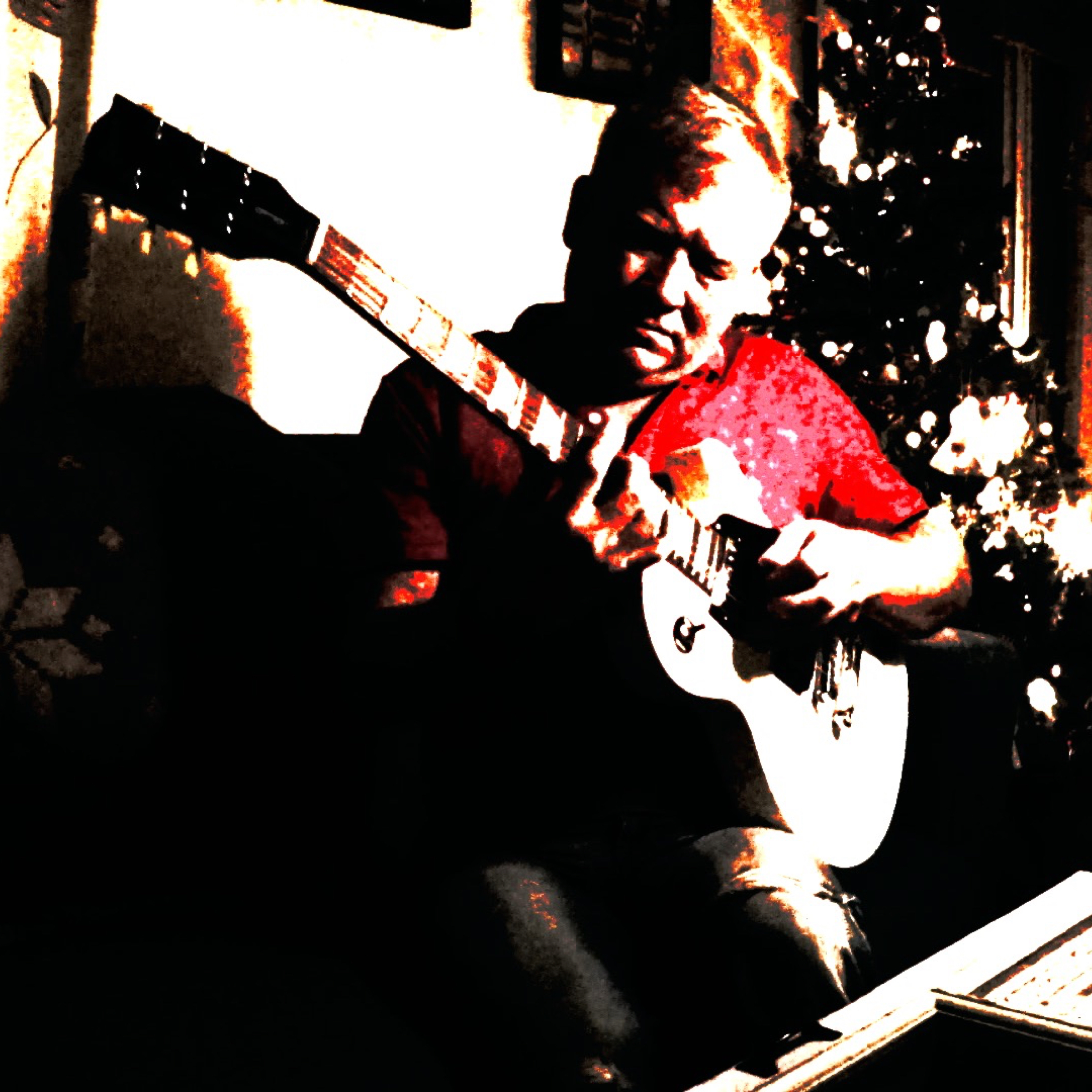 Cover fra singelen "Happy New Year Everyone